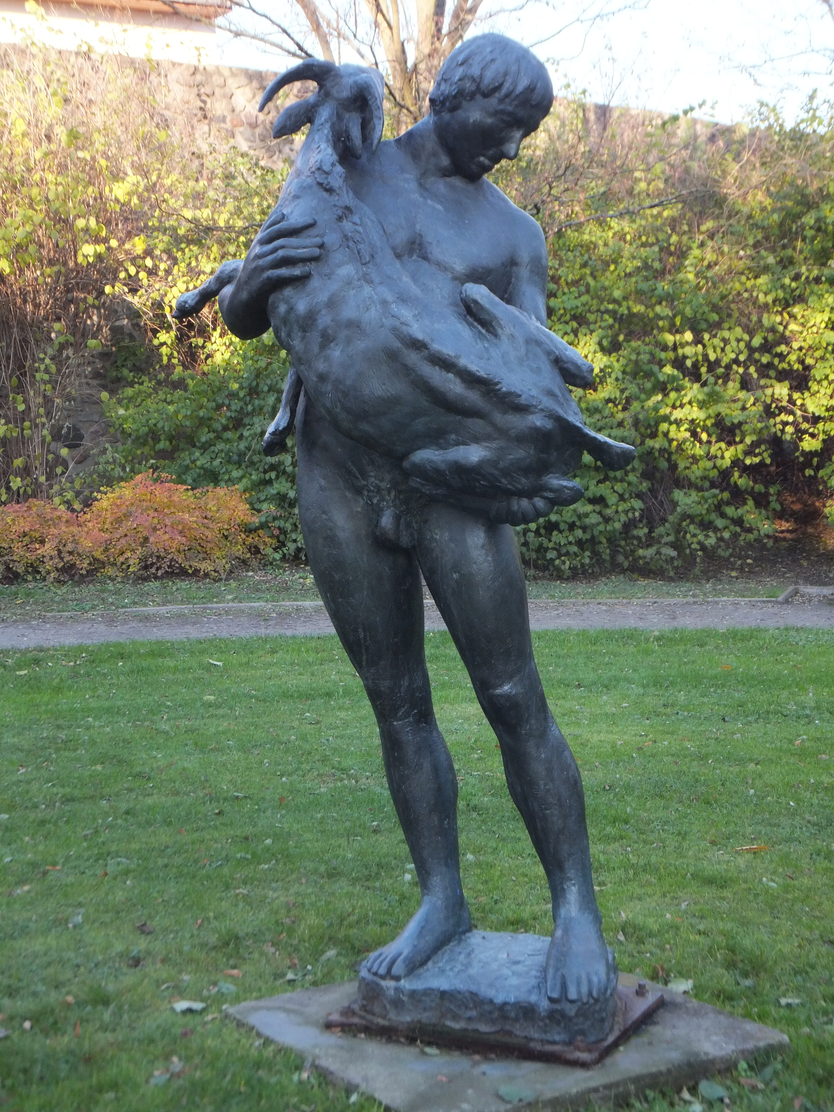 Bildhauer Friedrich Schötschel